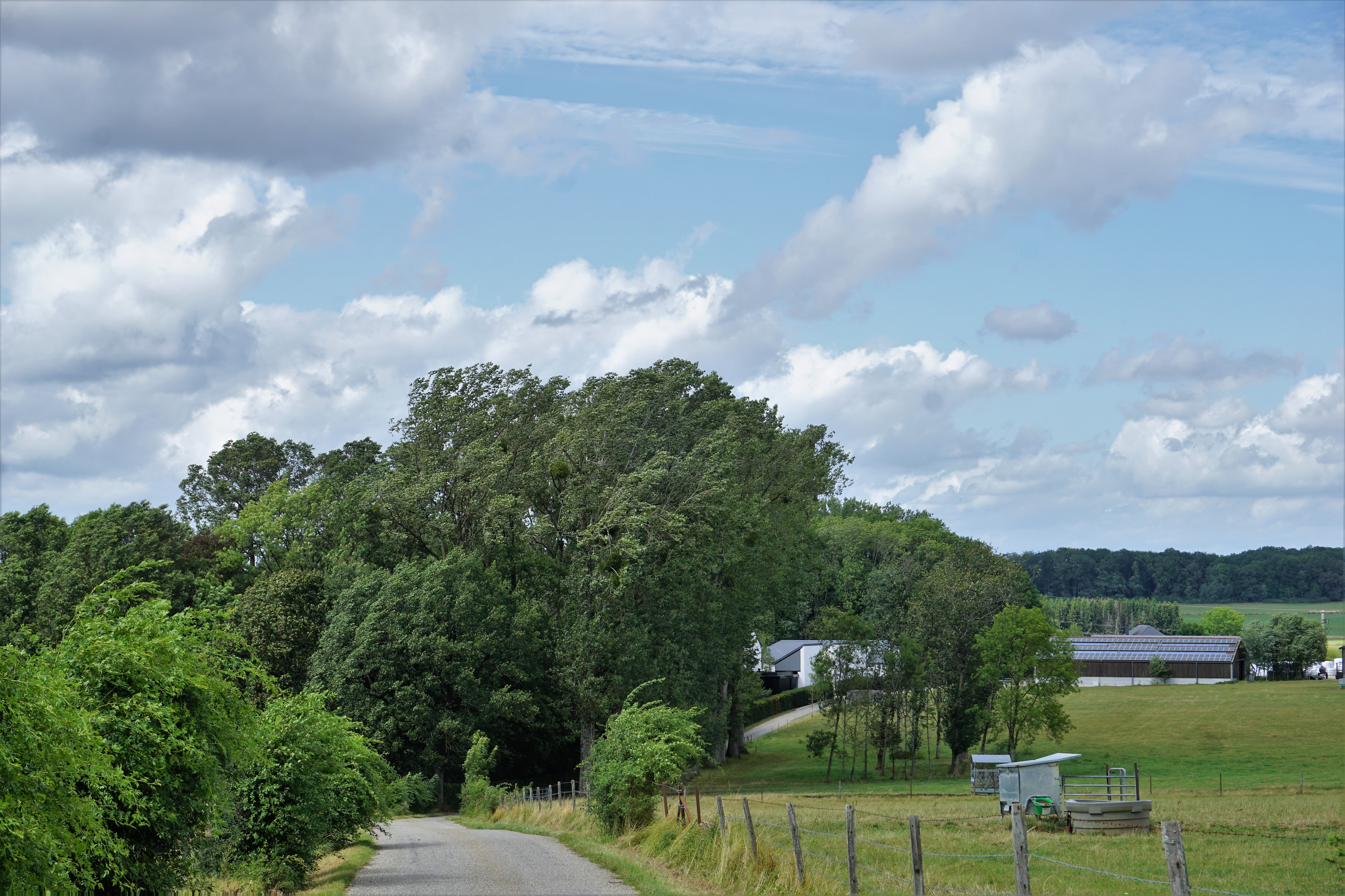 Consdorf, lieu-dit Ousterholz.